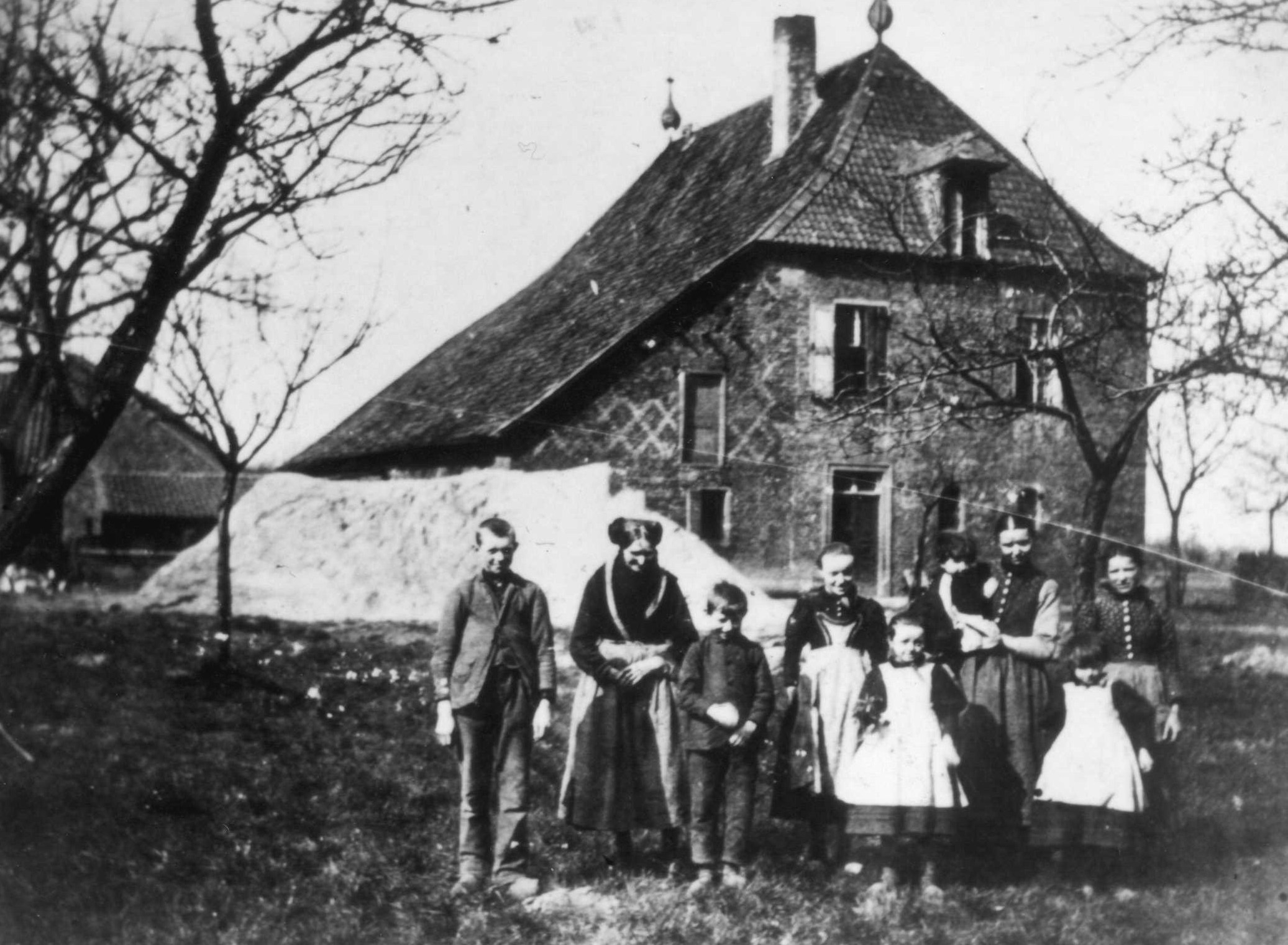 Der ehemalige Herrensitz in dem der Abt von Werden, wenn er zur Revision, Jagt oder zum Gericht nach Asterlagen kam, wohnte. Auf dem Foto die Familie Schürmann, die ab 1824 Besitzer war.